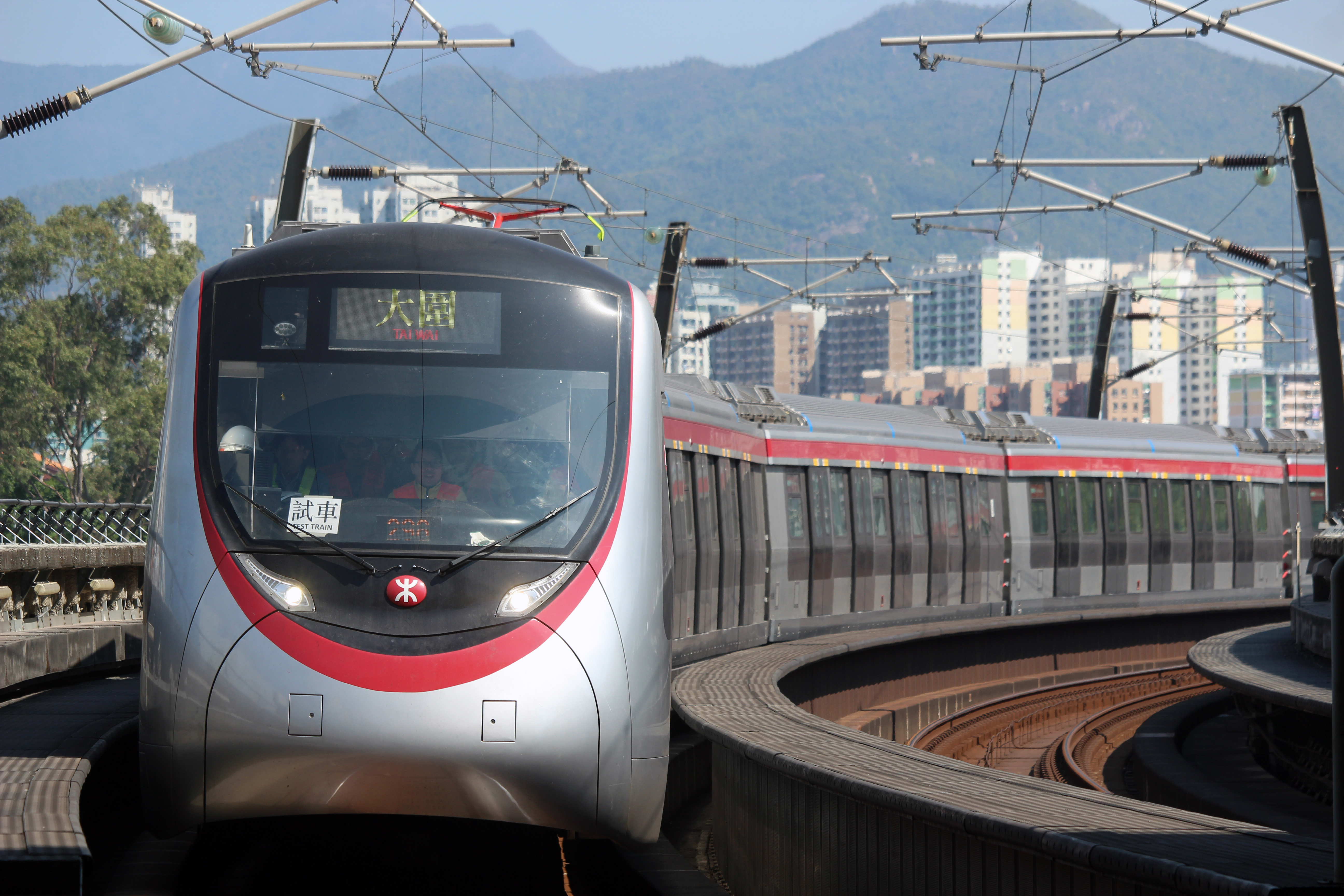 中文（香港）: 馬鞍山綫1141A列車正進入大圍站3號月台（正進行日間行車測試）